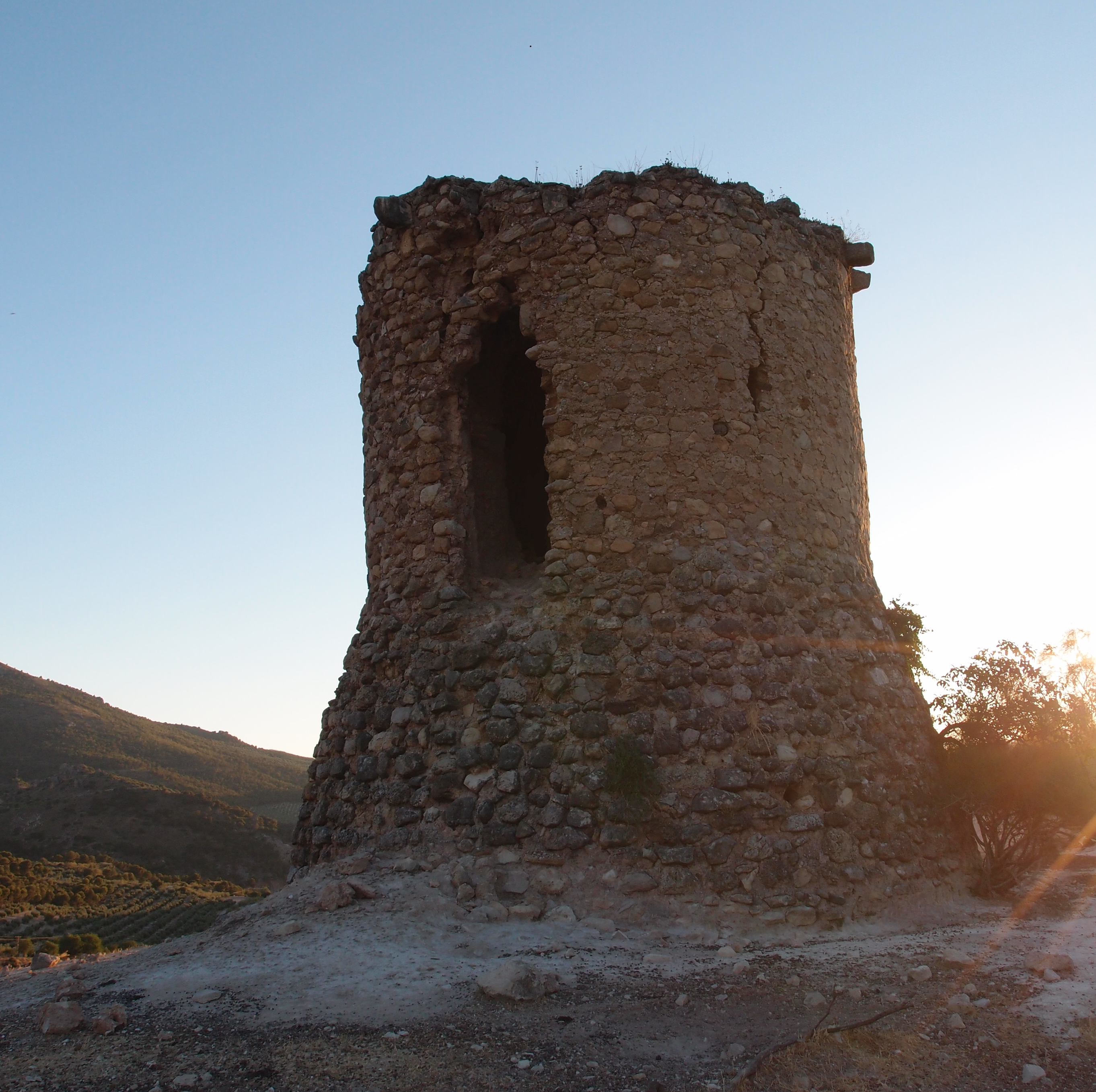 Torre de la Cabeza